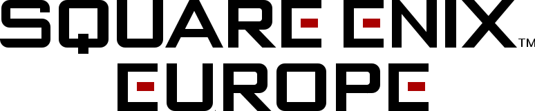 Logo von Square Enix Europe